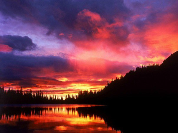 Река Кан